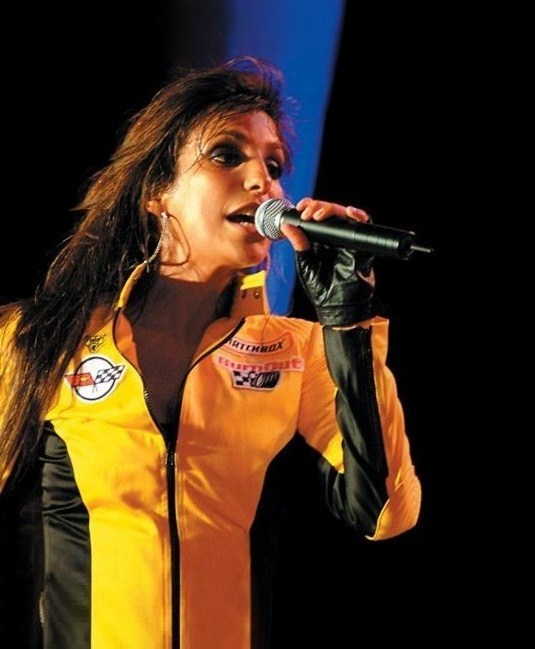 Foto de meu arquivo pessoal de shows de Ivete Sangalo. Ivete durante a turnê MTV em 2004 em Natal, RN.